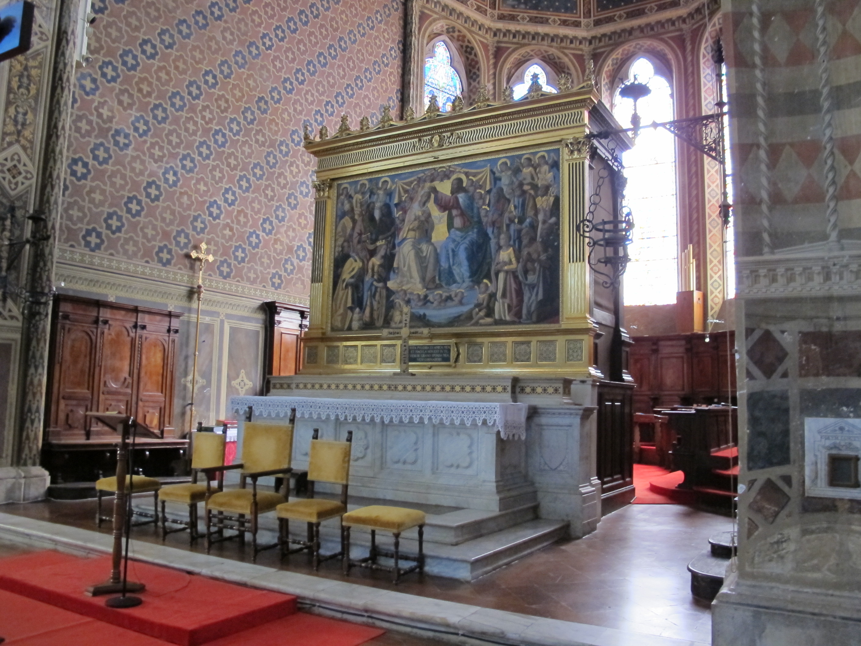 Basilica dei servi, siena 17 altare maggiore